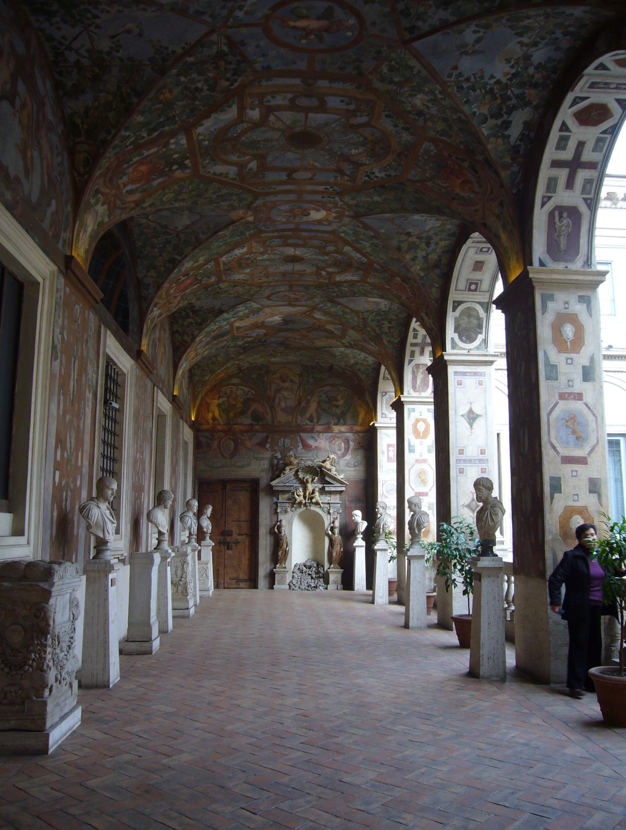 Roma, Palazzo Altemps: galleria del piano nobile.